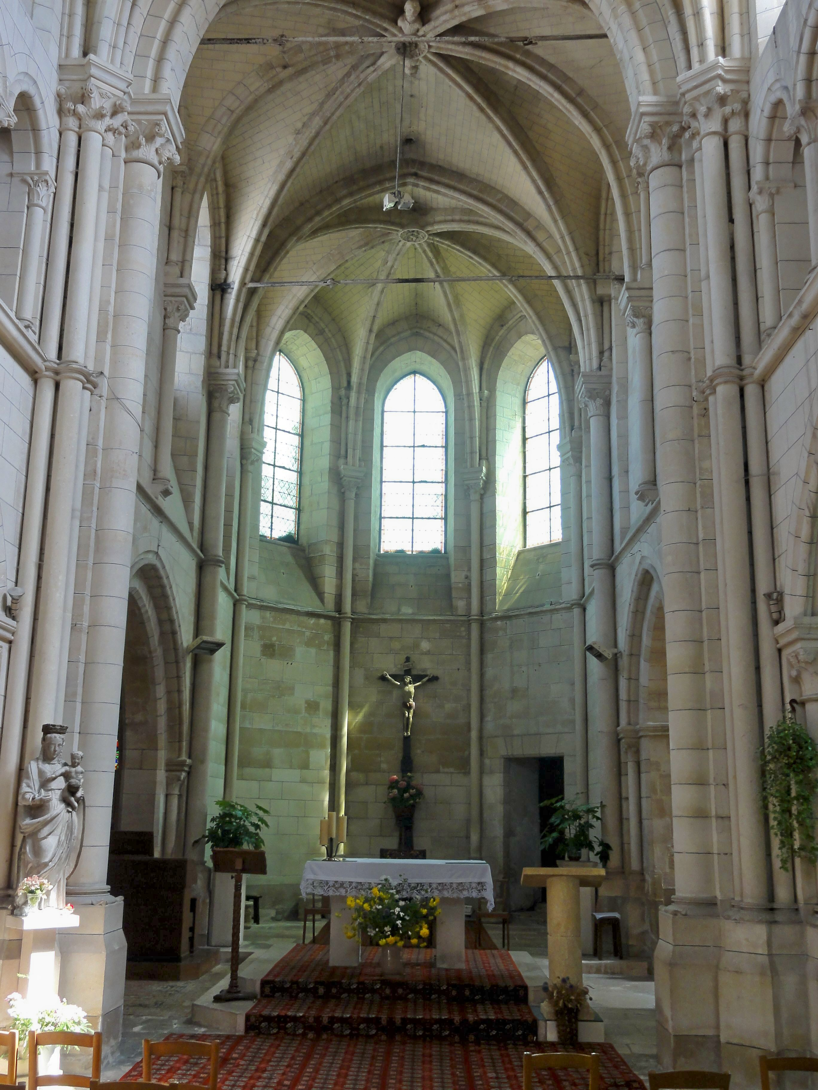 Chœur.